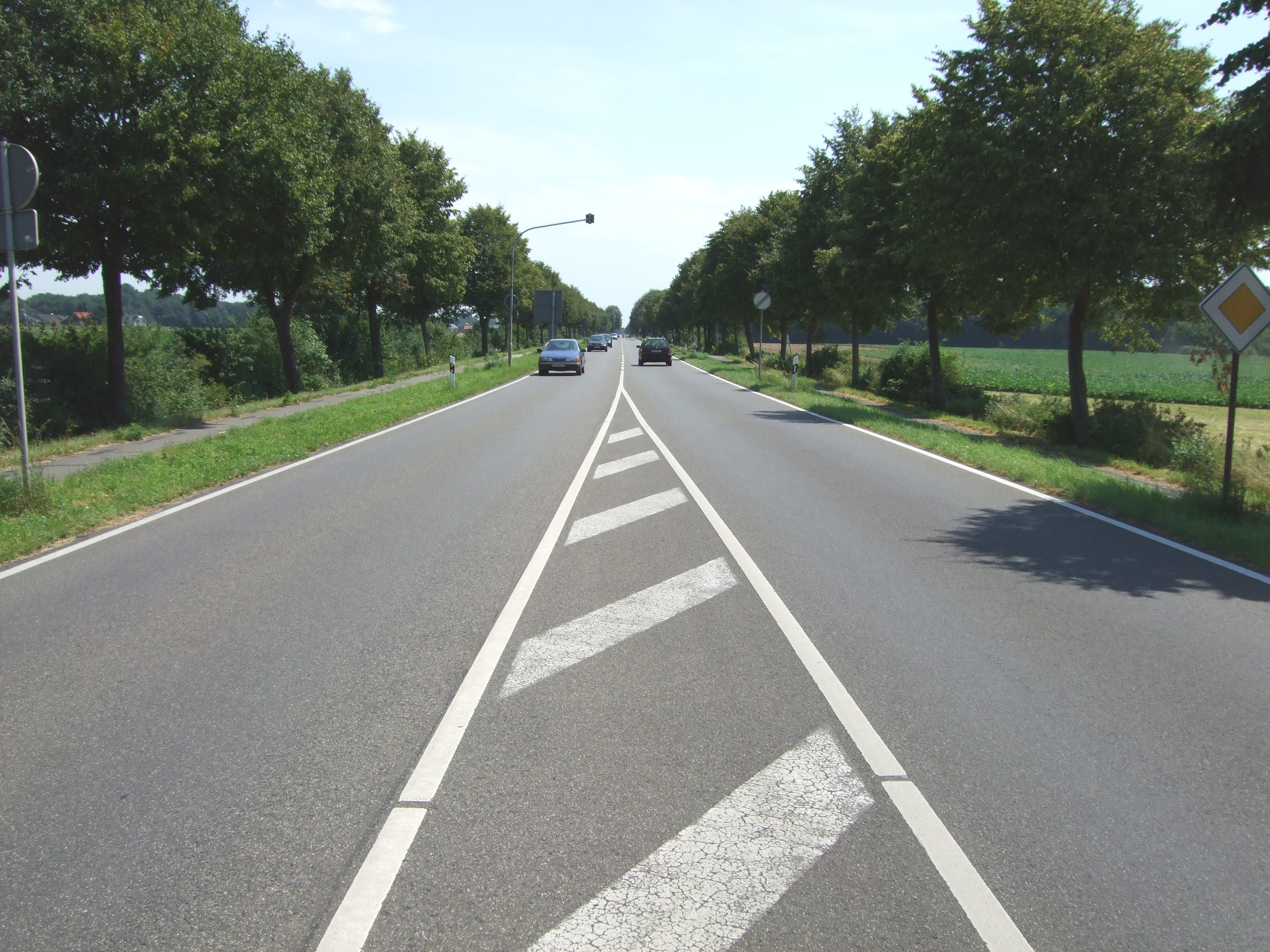 Erkelenzer-Gerade der ehemaligen Rennstrecke Grenzlandring im Jahr 2007